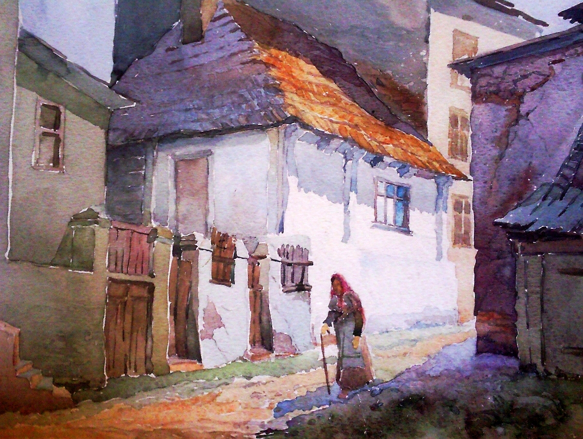 Dawna, XIX-wieczna Czeladź przedstawiona w akwareli autorstwa Zofii Hajdas. Na obrazie fragment ulicy Ciasnej.